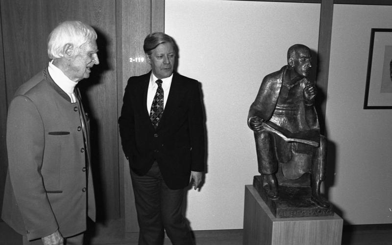 Bundeskanzler Helmut Schmidt empfängt den Bildhauer Prof. Gerhard Marcks anläßlich Aufstellung der Skulptur "Albertus Magnus" im Bundeskanzleramt.